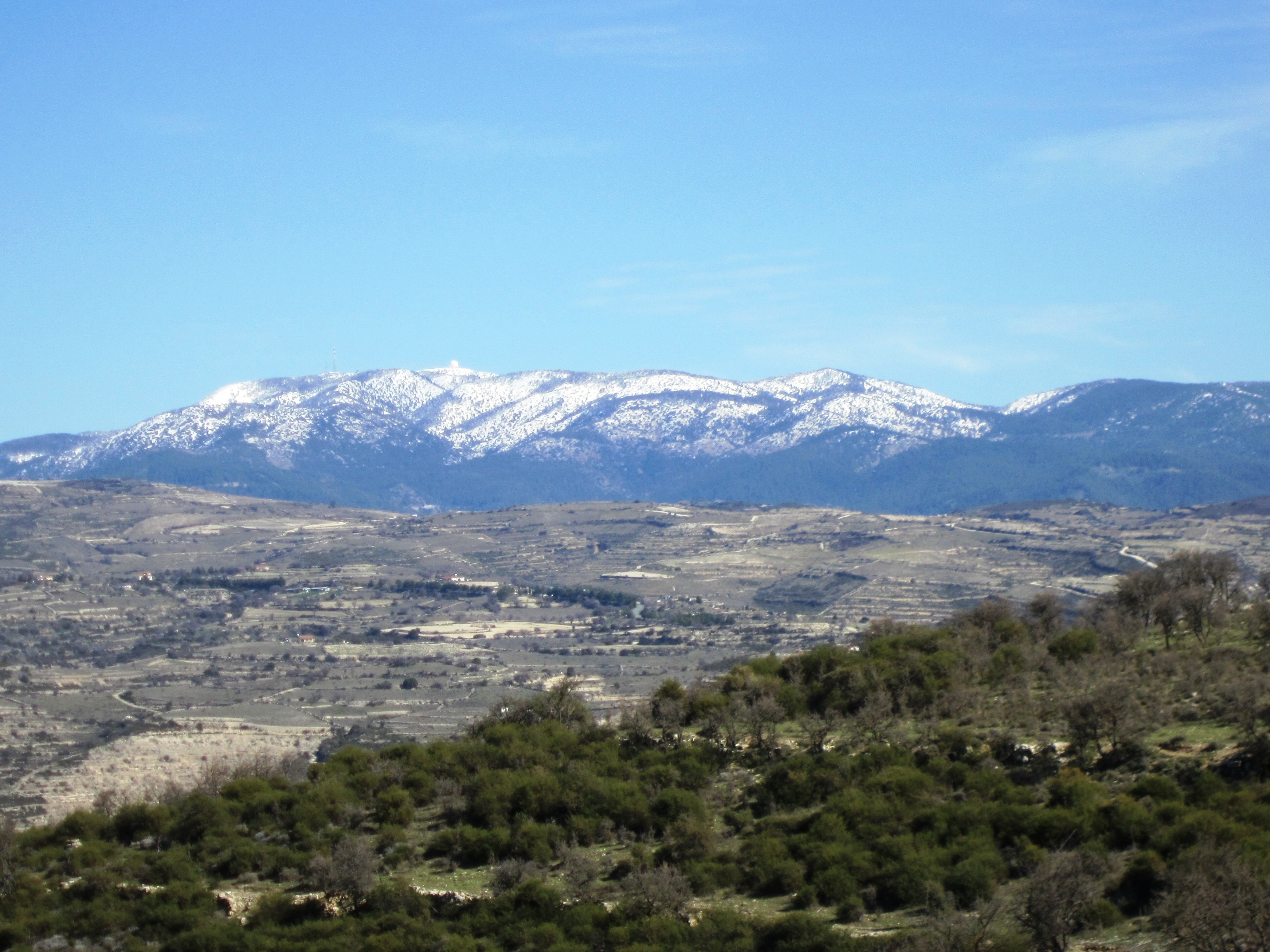 Cyprus - Cave of 318 Fathers 5 uitzicht